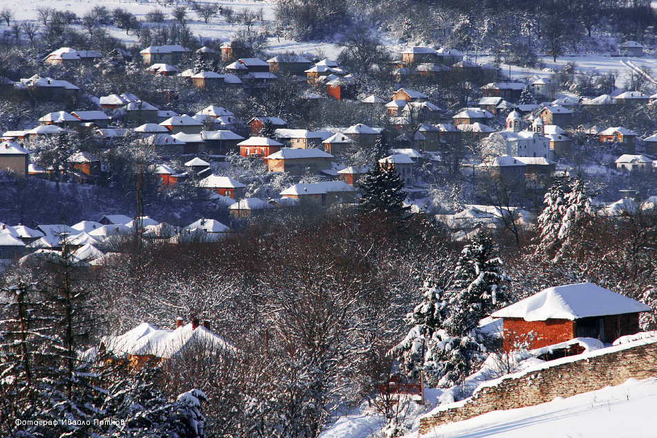 Село Беглеж - Община Плевен